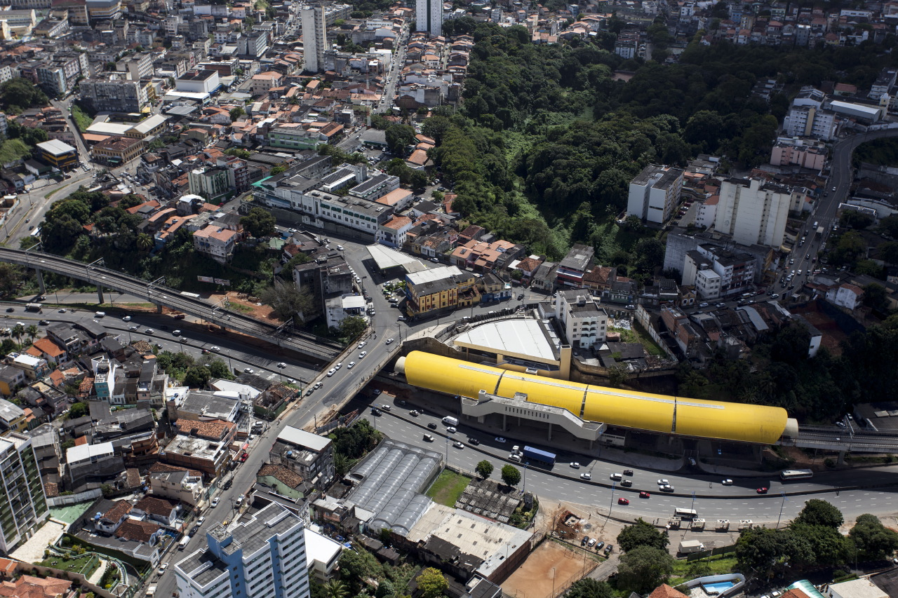 Estação da Linha 1 do metrô de Salvador, em Salvador.